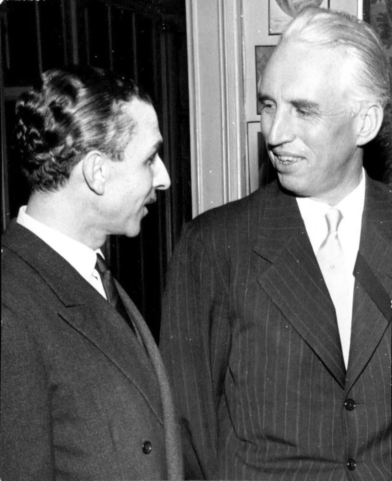 Större delen av diplomatiska kåren i Stockholm med ryska och amerikanska ambassadörerna i spetsen deltog i en mottagning på Blasieholmstorg 11 där Argentinas chargé d'affairs och madame Carlos Gaviola tog avsked från Sverige. Det populära diplomatparet, som nu efter åtta år i olika befattningar i nordiska länder återvänder till utrikesdepartementet i Buenos Aires, lämnar Sverige omkring nyår.